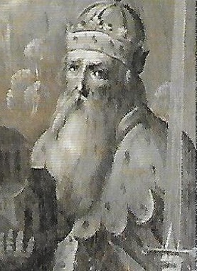 Extrait de